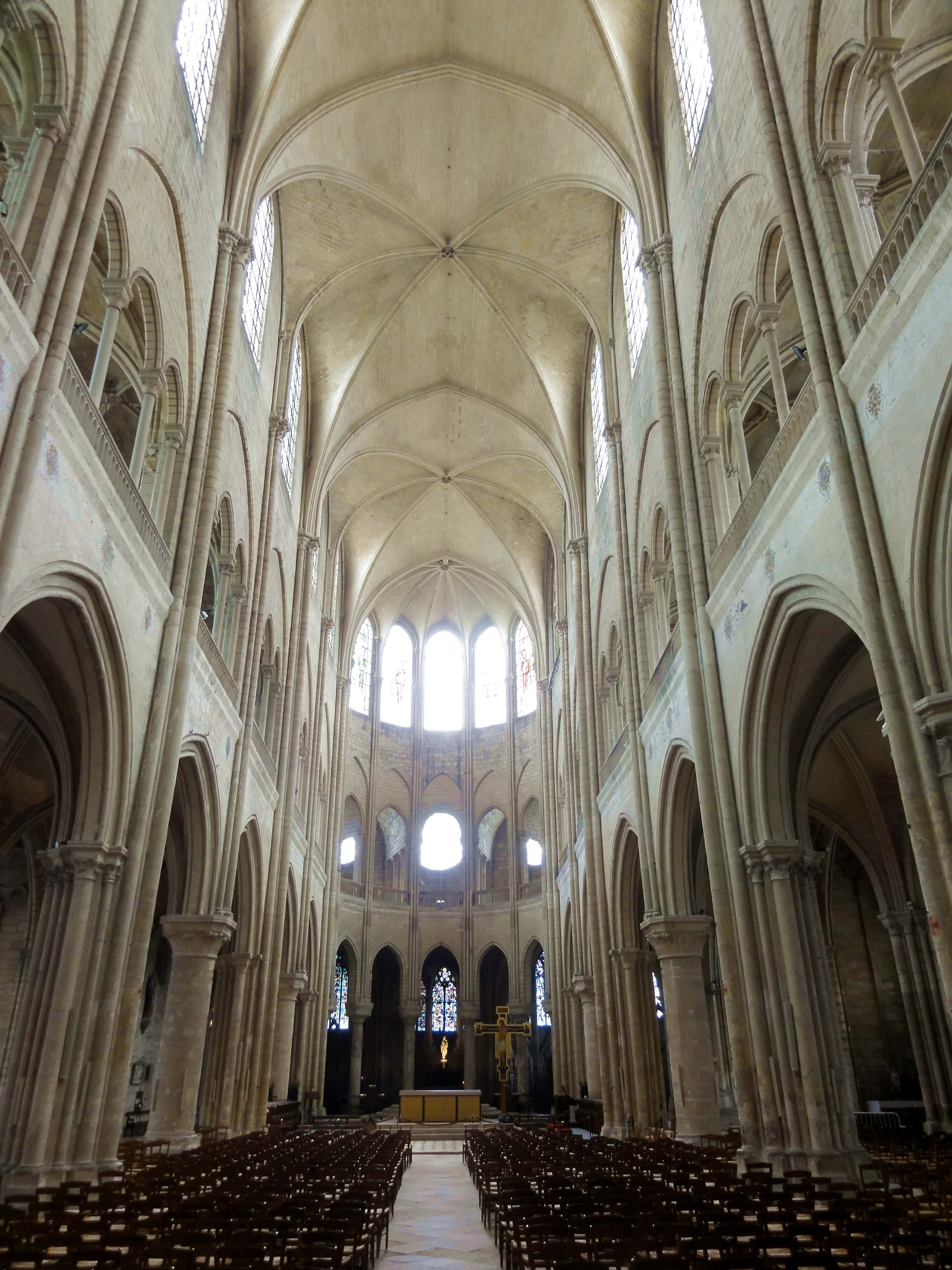 Intérieur de la collégiale - voir titre.